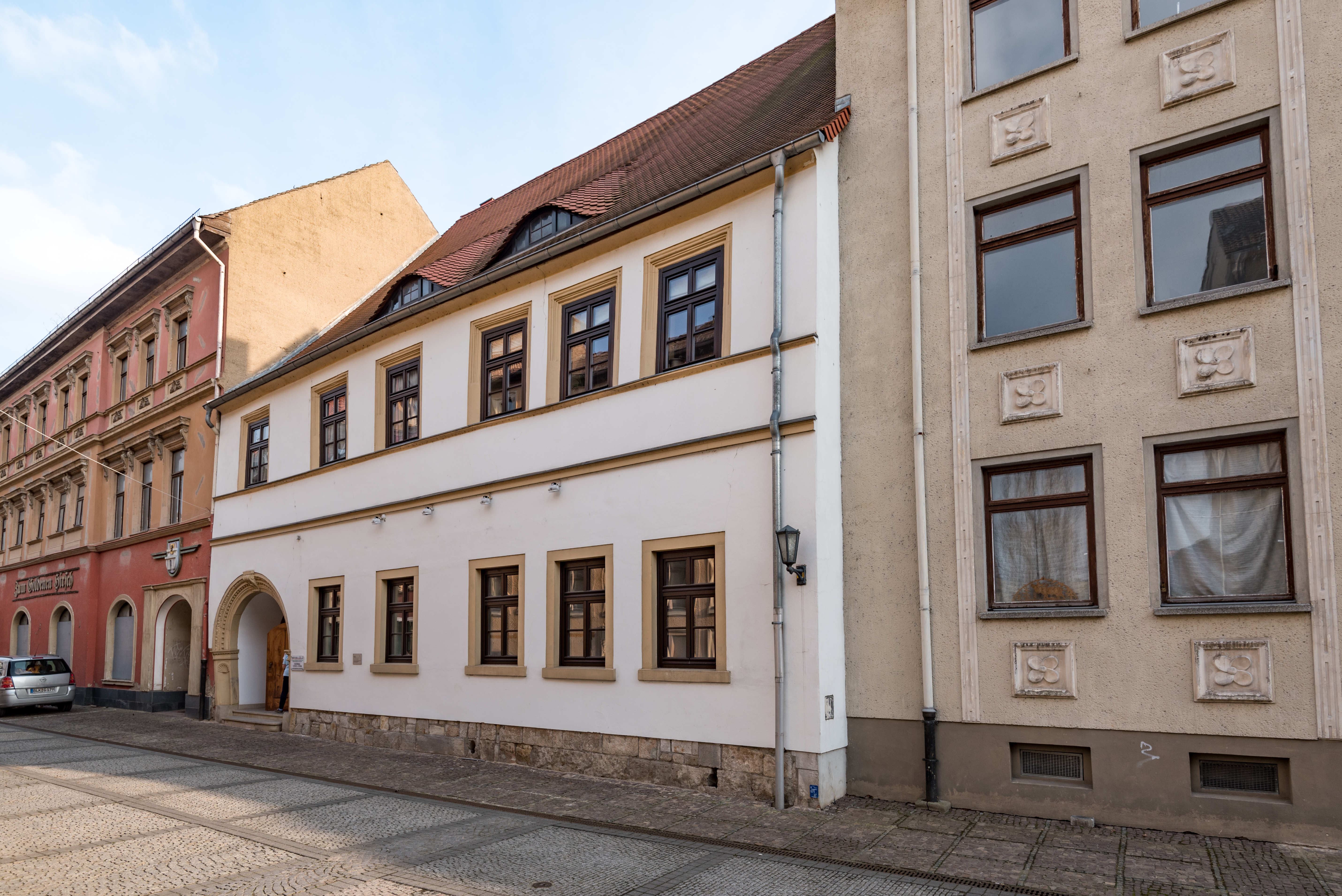 Weißenfels, Nikolaistraße 12